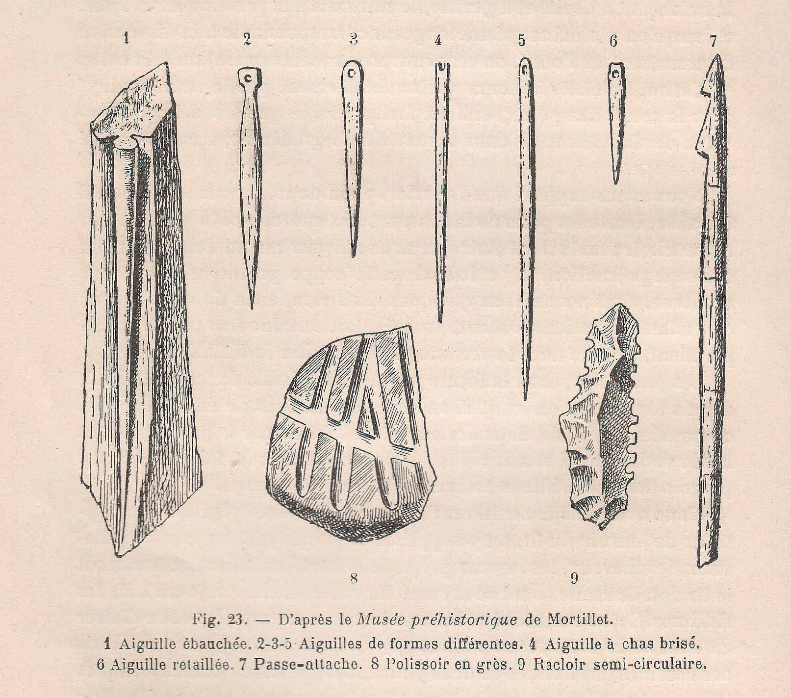 Aus L. Fougerat: La pelleterie et le vêtement de fourrure dans l'antiquité. Béranger, Paris 1914 Nombreuses illustrations d'apres les documents authentiques par P. Savigny.